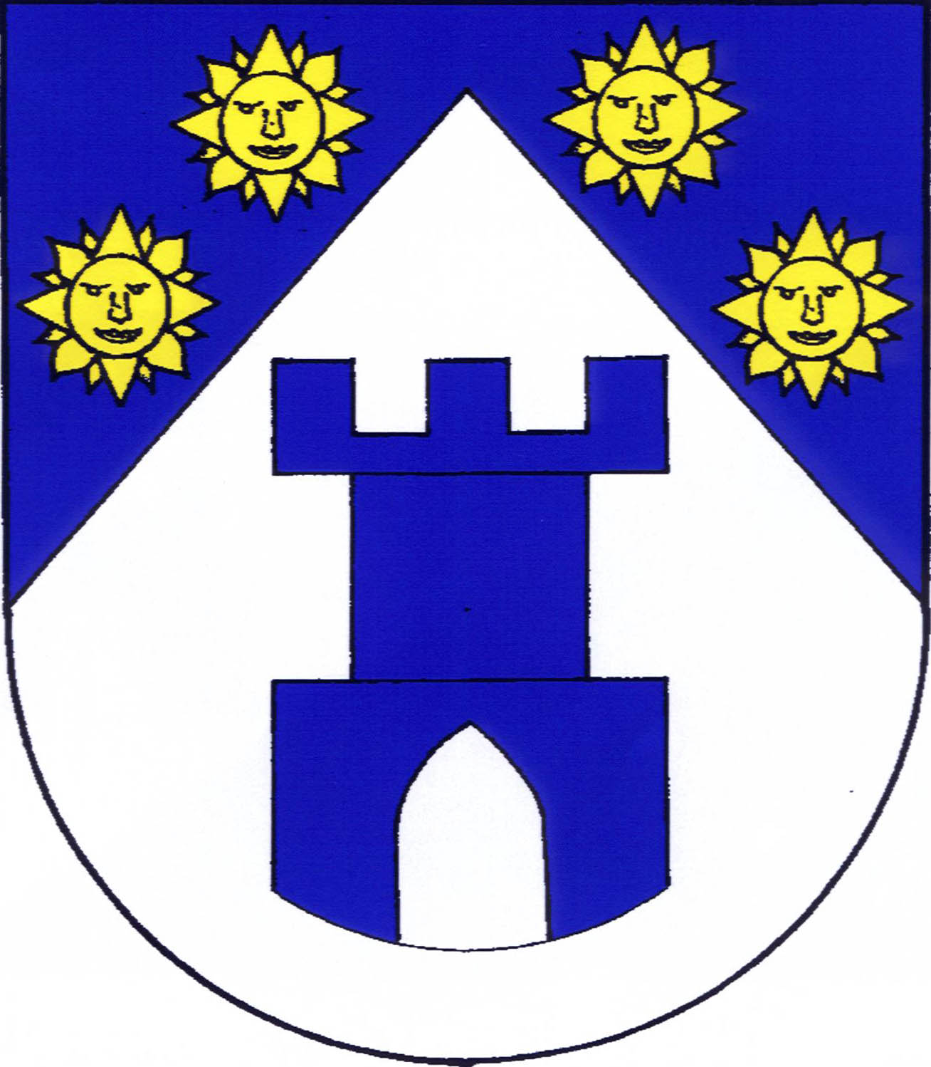 Znak obce Boseň